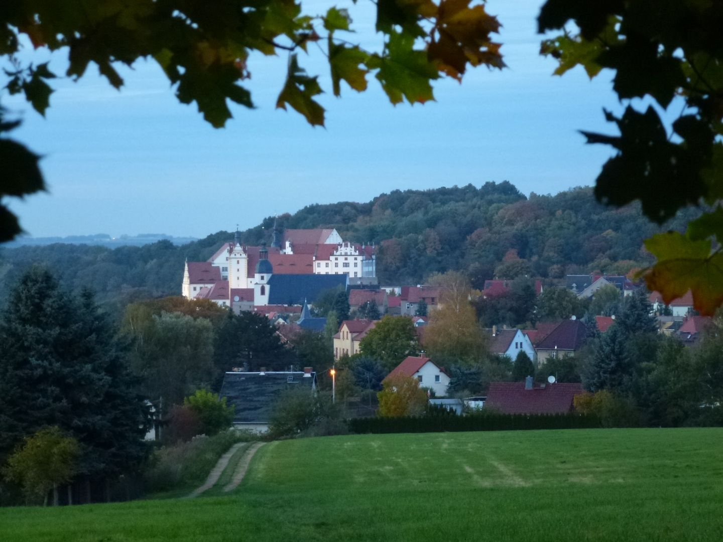 Blick vom Töpelsberg auf Colditz